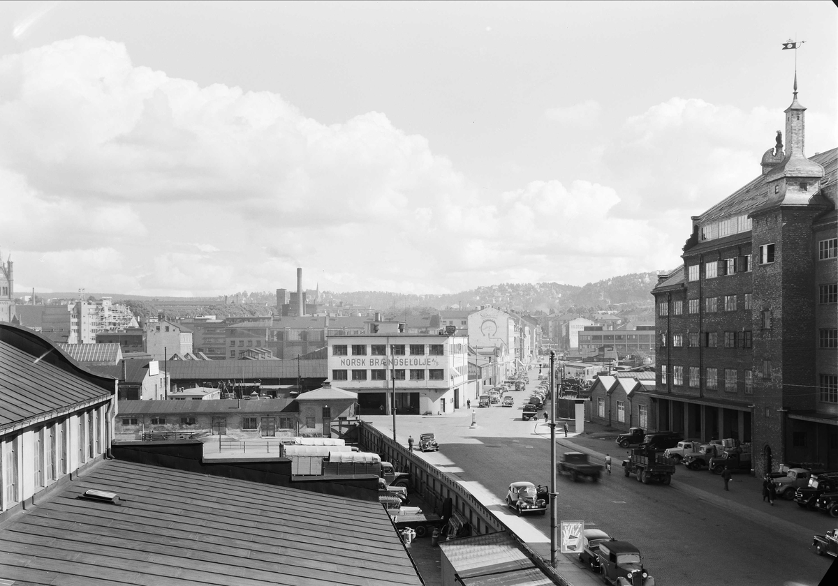 Schweigaards gate i Oslo, fortografert mot øst 20. august 1953. Jernbanetollstedet til høyre i bildet, Kristiania Slagtehus til venstre.